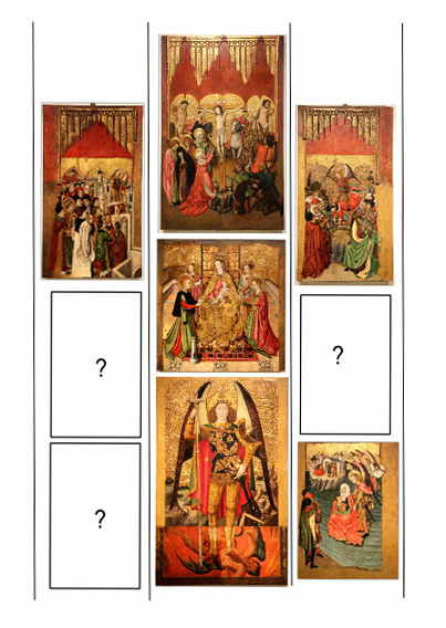 Estructura retaule sant Miquel (Huguet) s.XV